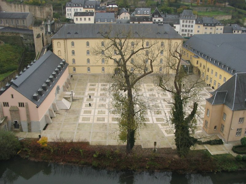 Hof der Abtei Neumünster in Luxemburg (Stadt). Blick in den neu gestalteten Hof der Abtei Neumünster